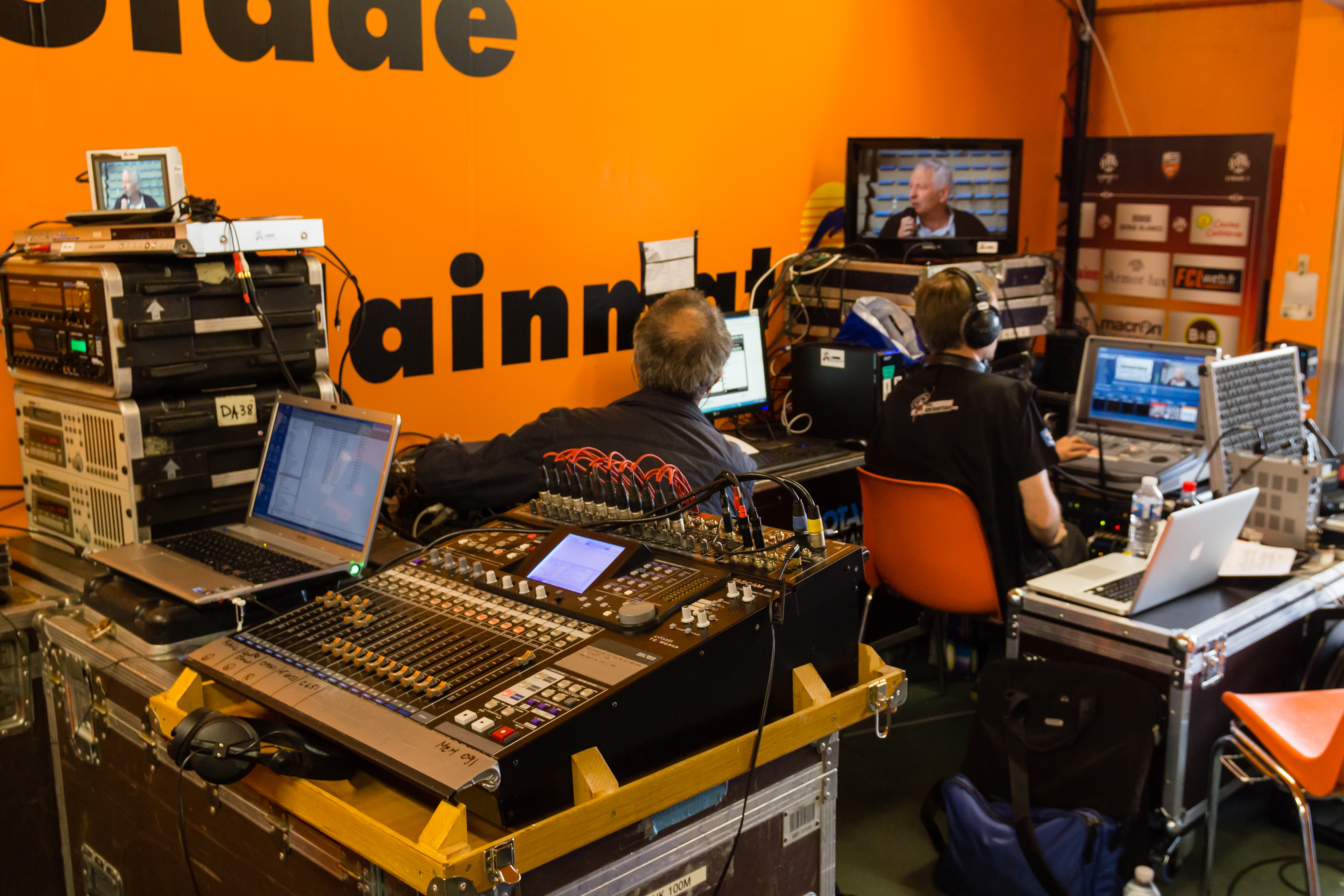 FIL 2012 - Championnat national des bagadoù - première catégorie - Régie TV